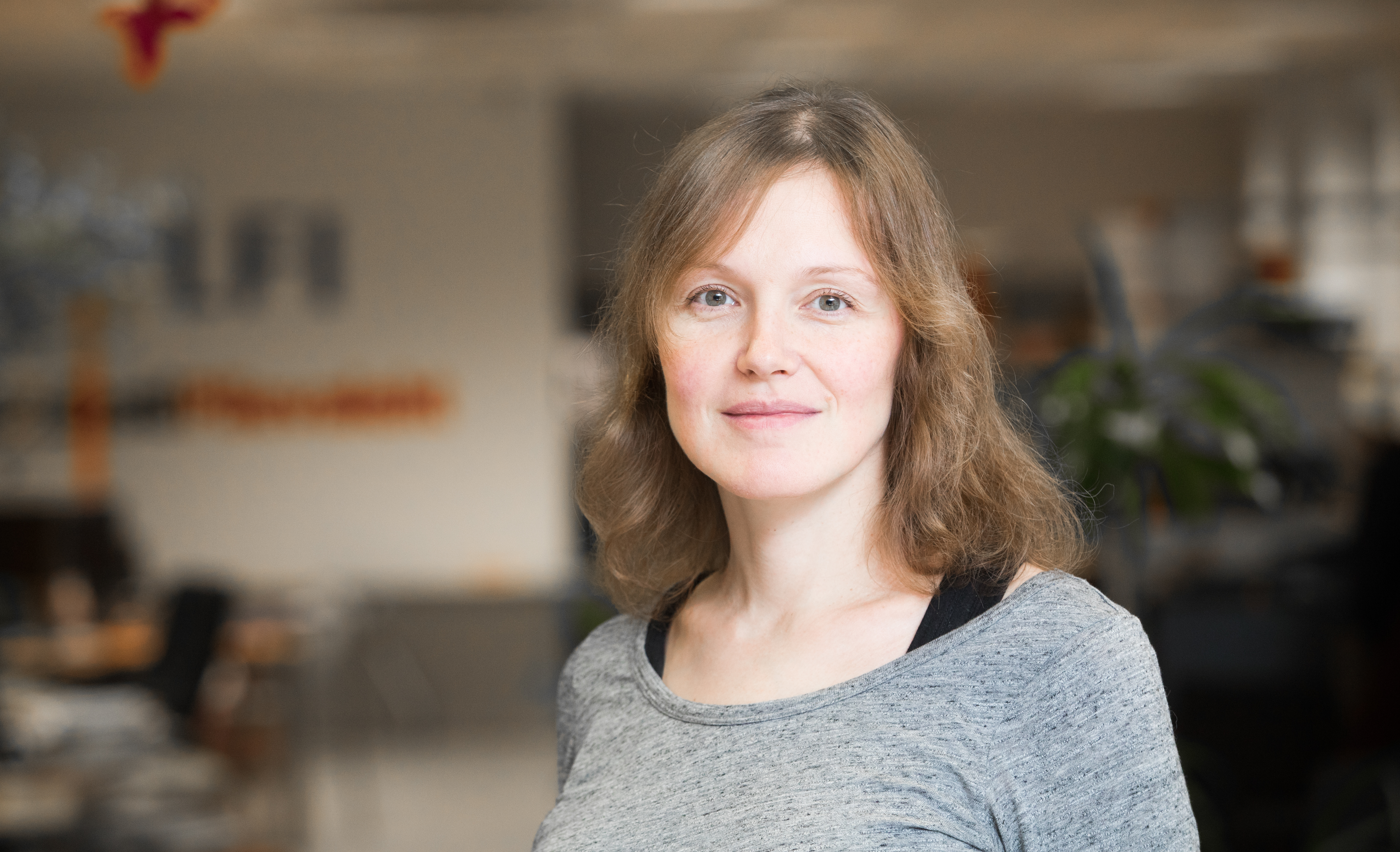 Külli-Riin Tigasson